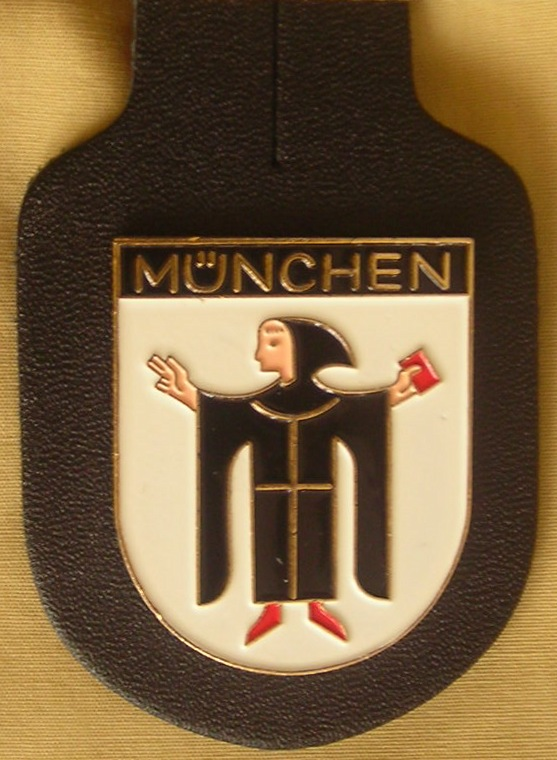 Verbandsabzeichen als Brusttaschenanhänger (PP München) mit dem Münchner Kindl